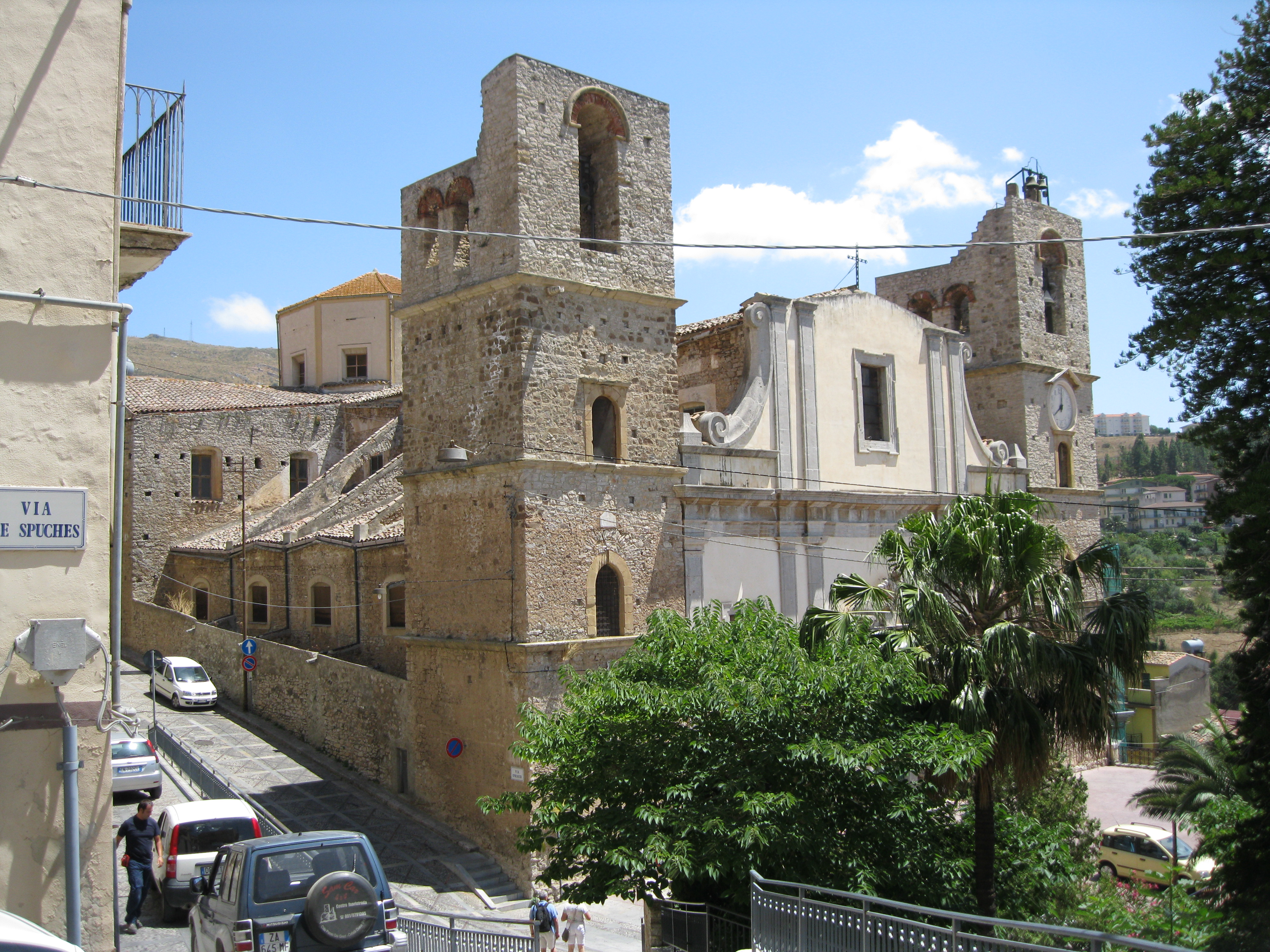 La chiesa parrocchiale della Santissima Annunziata a Caccamo, nella città metropolitana di Palermo.